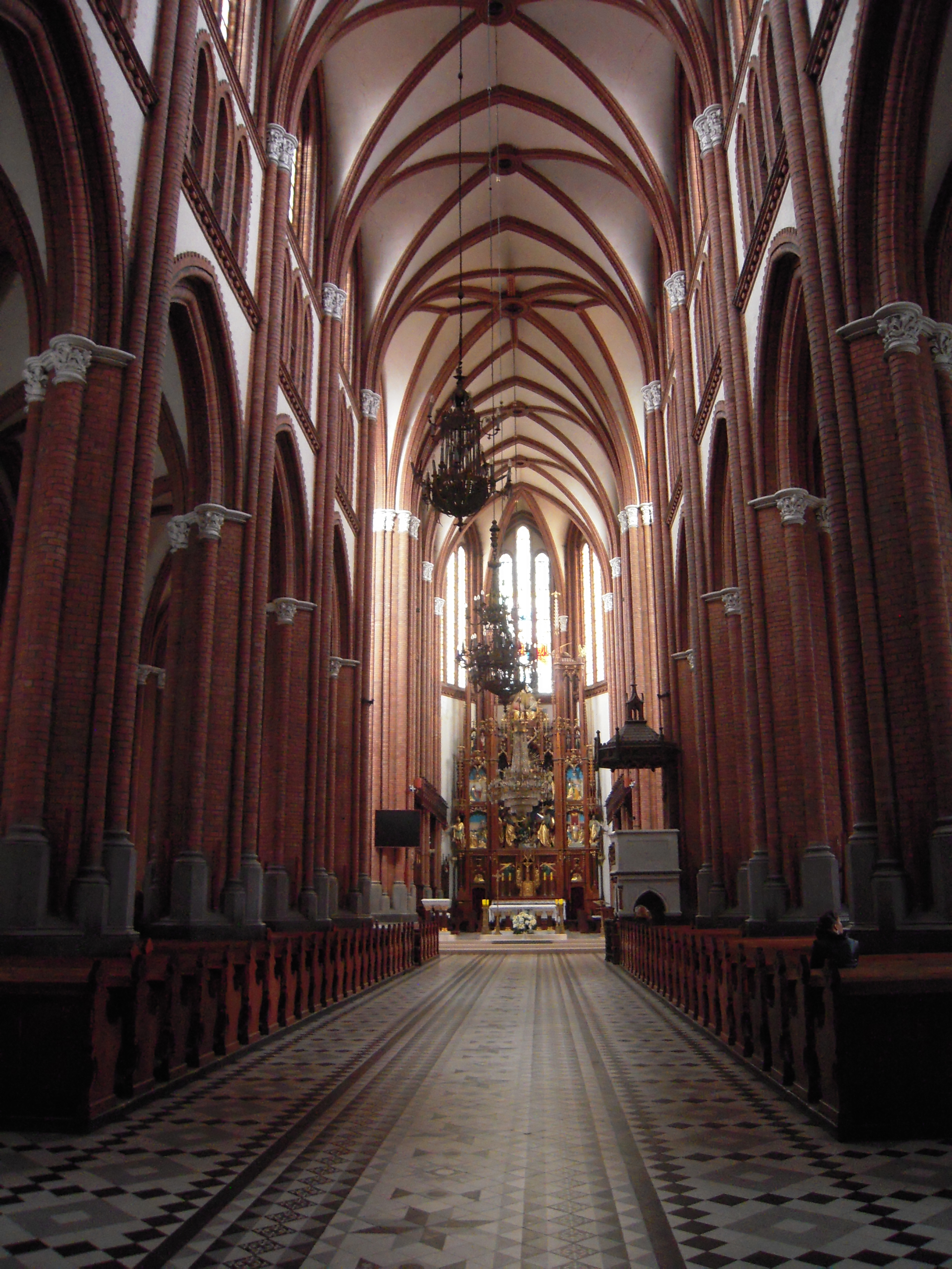 Białystok - Bazylika archikatedralna Wniebowzięcia NMP (zabytek nr A-192 z 28.01.1980)